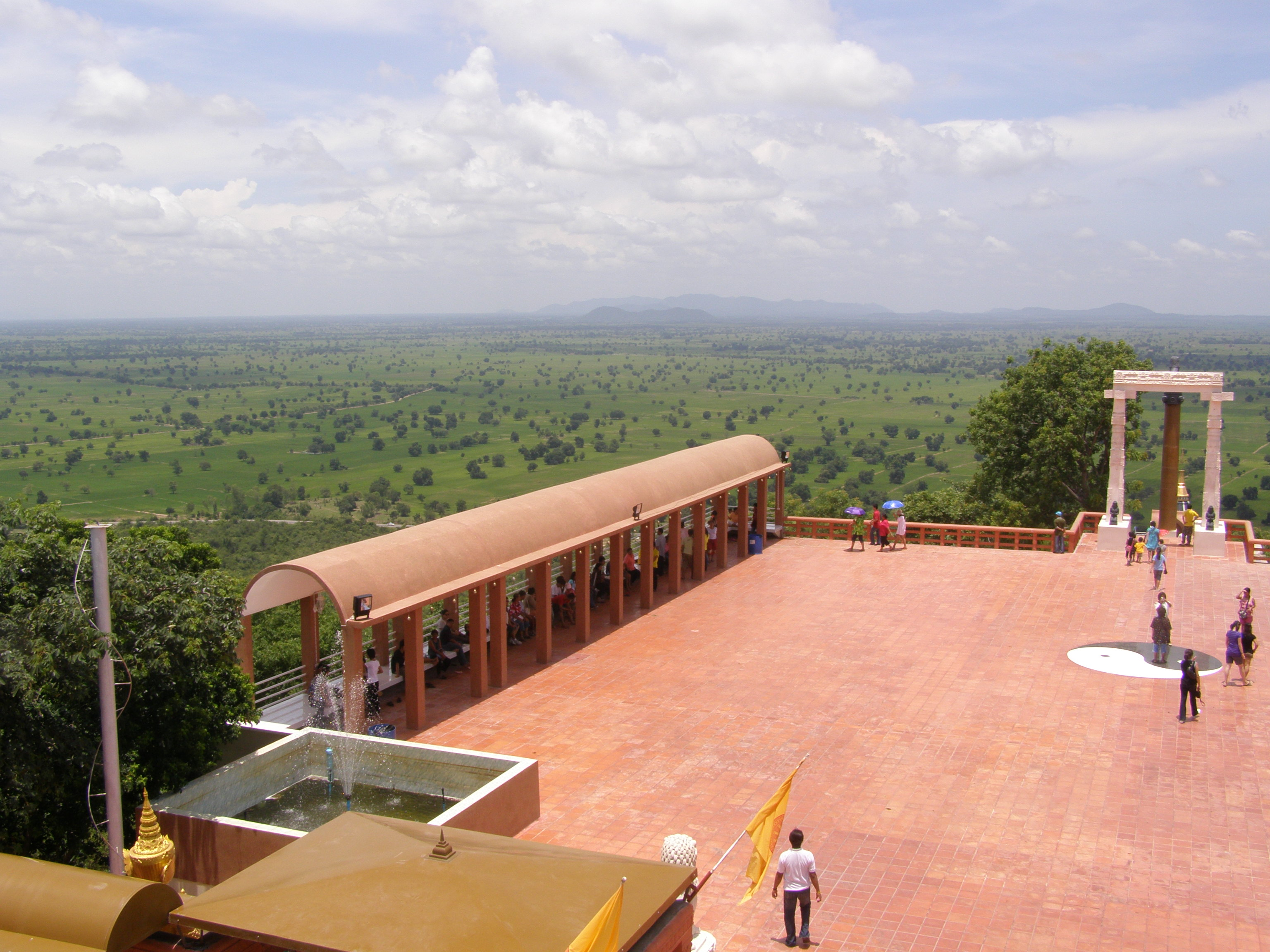 Wat Khao Khok Phen